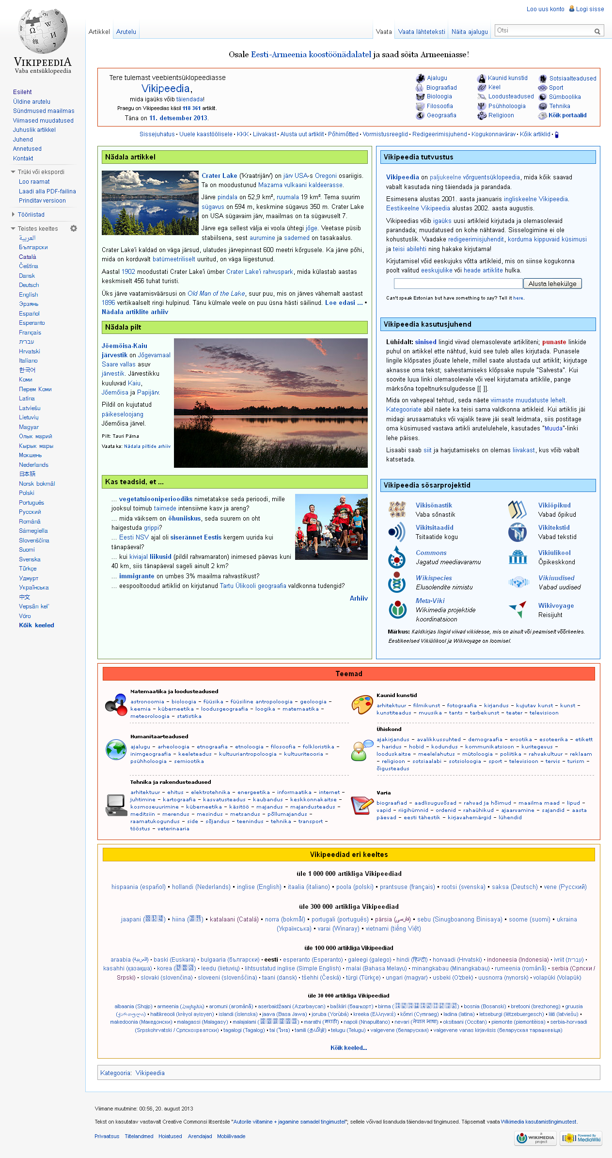 Screenshot - Hlavní strana Cebuánské Wikipedie ze dne 11. prosince 2013